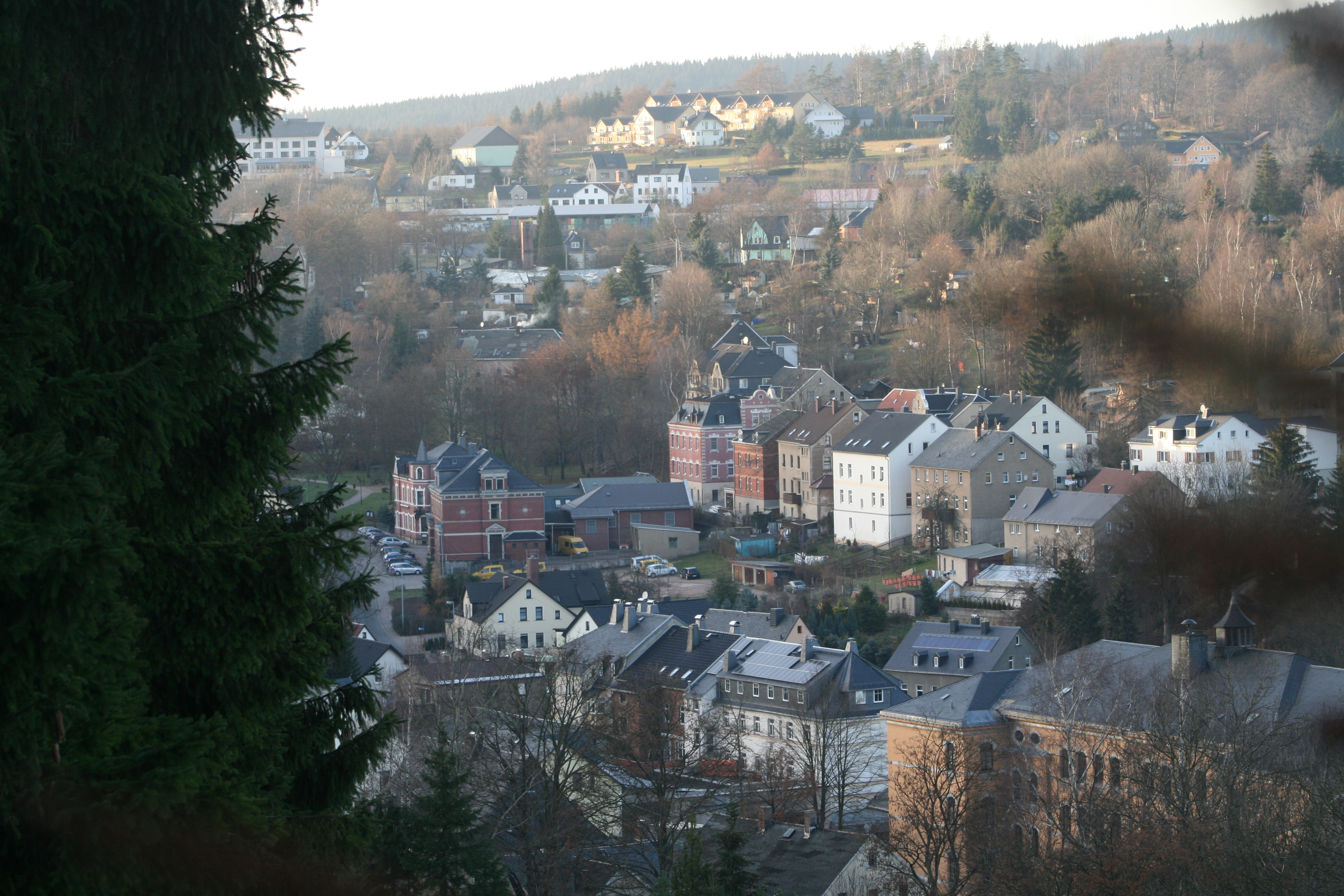 Schönheide im Erzgebirge: Vom Denkmal am Knock geht der Blick über Mitteldorf und Ortsteil Fuchswinkel zum Fuchsstein. Rechts das imposante Gebäude der Geschwister-Scholl-Schule, die von 1896 bis 1998 gebaut wurde. Die roten Ziegelbauten links sind vorn die Post von 1891 und dahinter das Hotel zur Post etwa aus der gleichen Zeit. Mehrfamilienhäuser aus der Gründerzeit und später zeigen die stadtähnliche Bebauung aus der Zeit der Verstädterung. Neuere Bauten aus den 1990er und 2000er Jahren finden sich im oberen Bildbereich am Fuchsstein. Fotografiert vom Berg Knock aus.